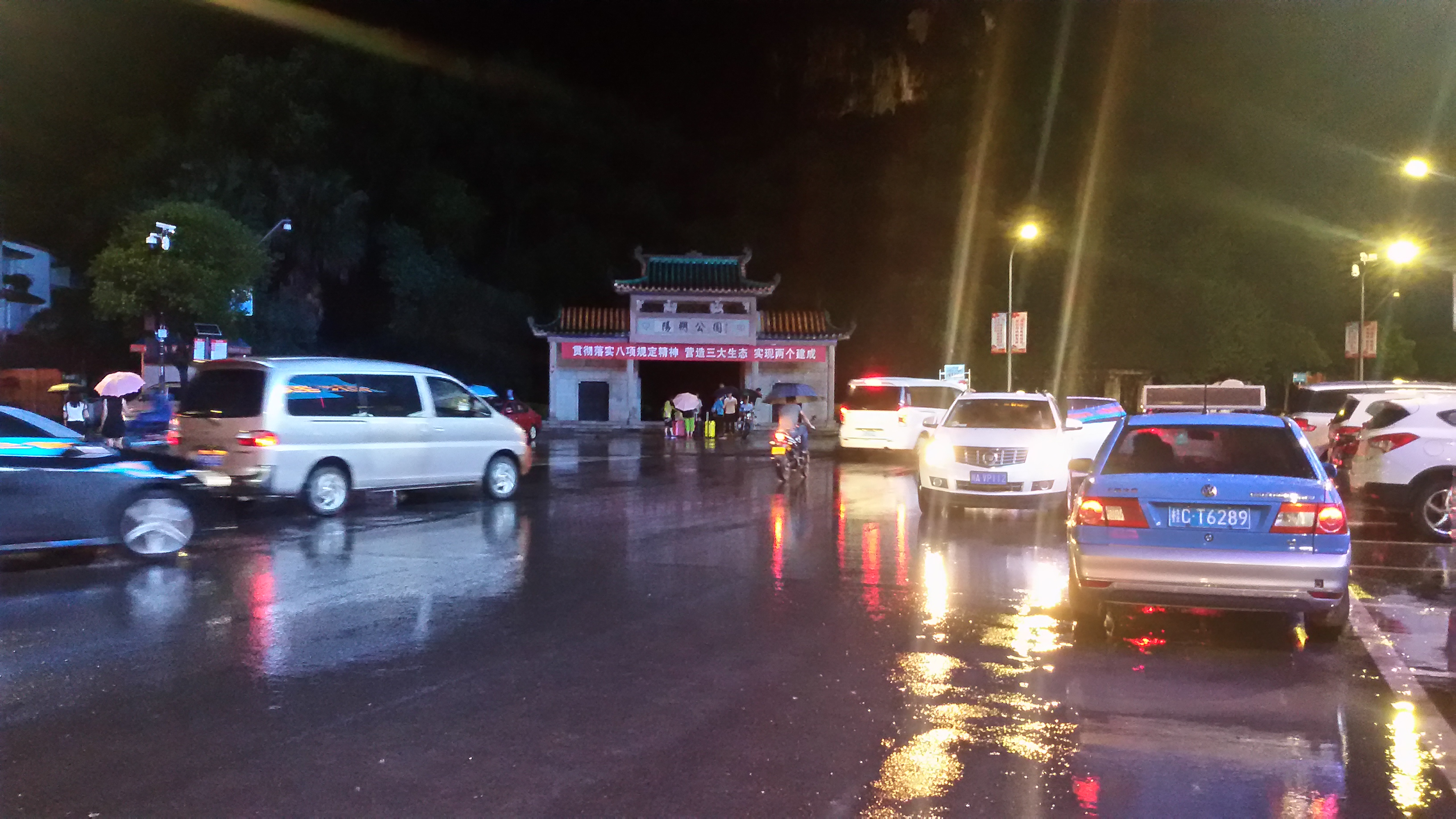 粵語: 桂林陽朔公園